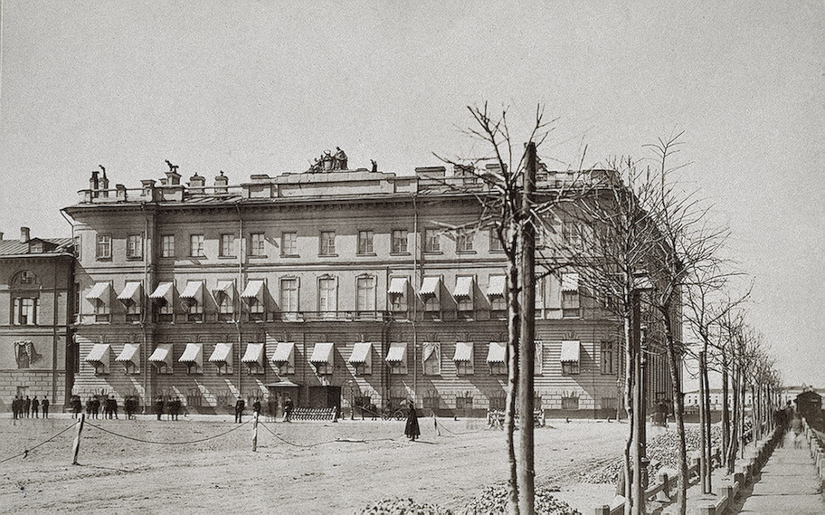 Дом принца Ольденбургского (Бецкого) на Дворцовой набережной, 1870-е гг. Фелиш, Альберт Эдуардович